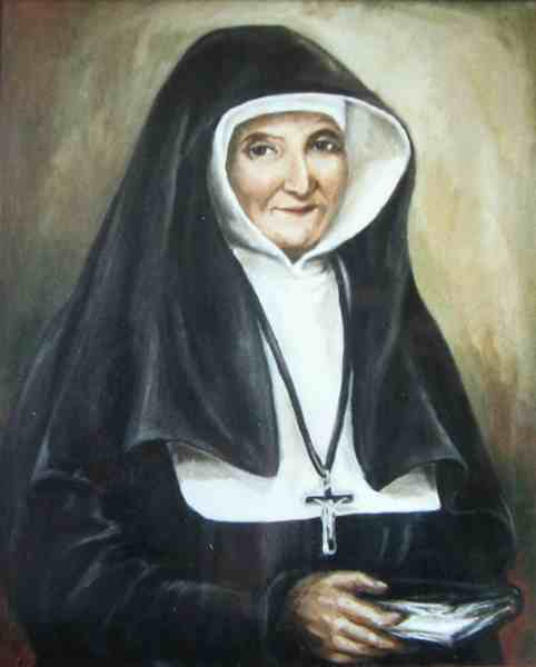 Elisabeth Gruyters, voluit Maria Elisabeth Gruyters (Leut, 1 november 1789 - Maastricht, 26 juni 1864) was de stichter van de congregatie Liefdezusters van de Heilige Carolus Borromeus .